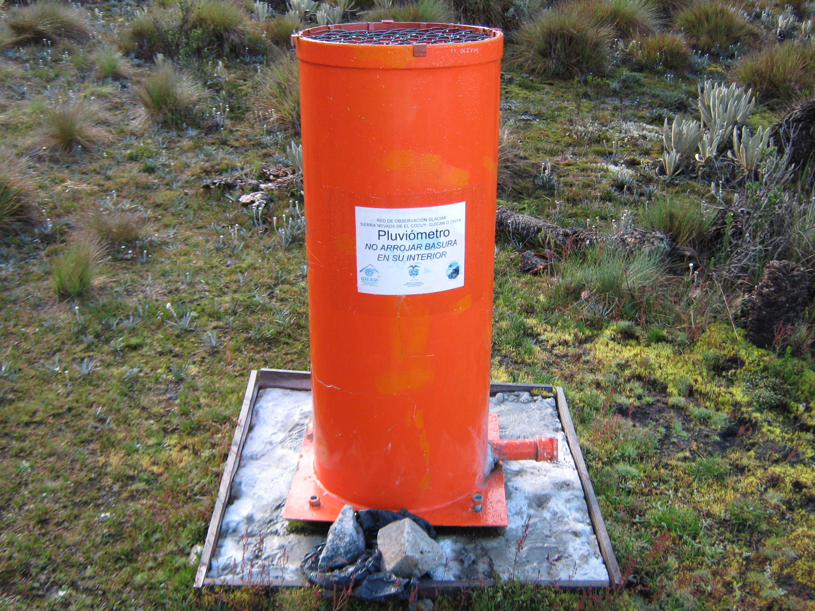 Pluviómetro del Instituto de Estudios Ambientales, en el Parque Nacional Natural Sierra Nevada del Cocuy, Colombia